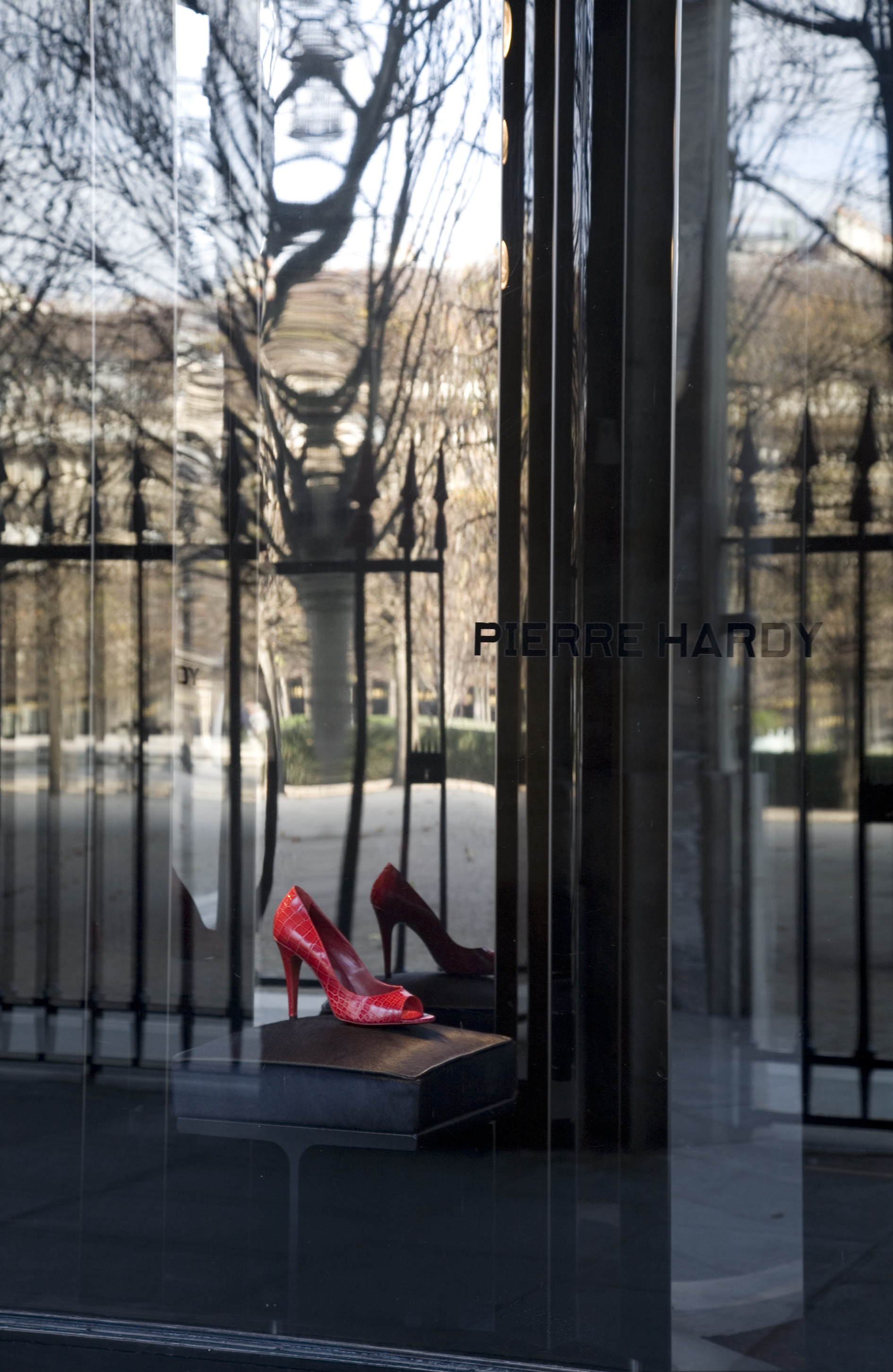 vitrine de la boutique Pierre Hardy, Galerie de Valois